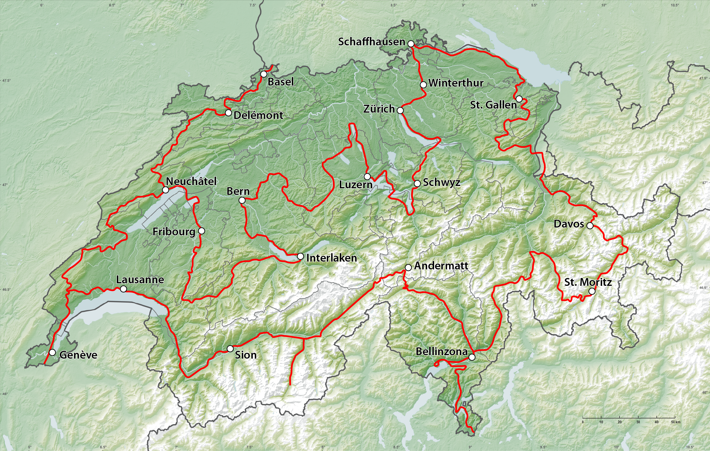 Karte der Grand Tour of Switzerland